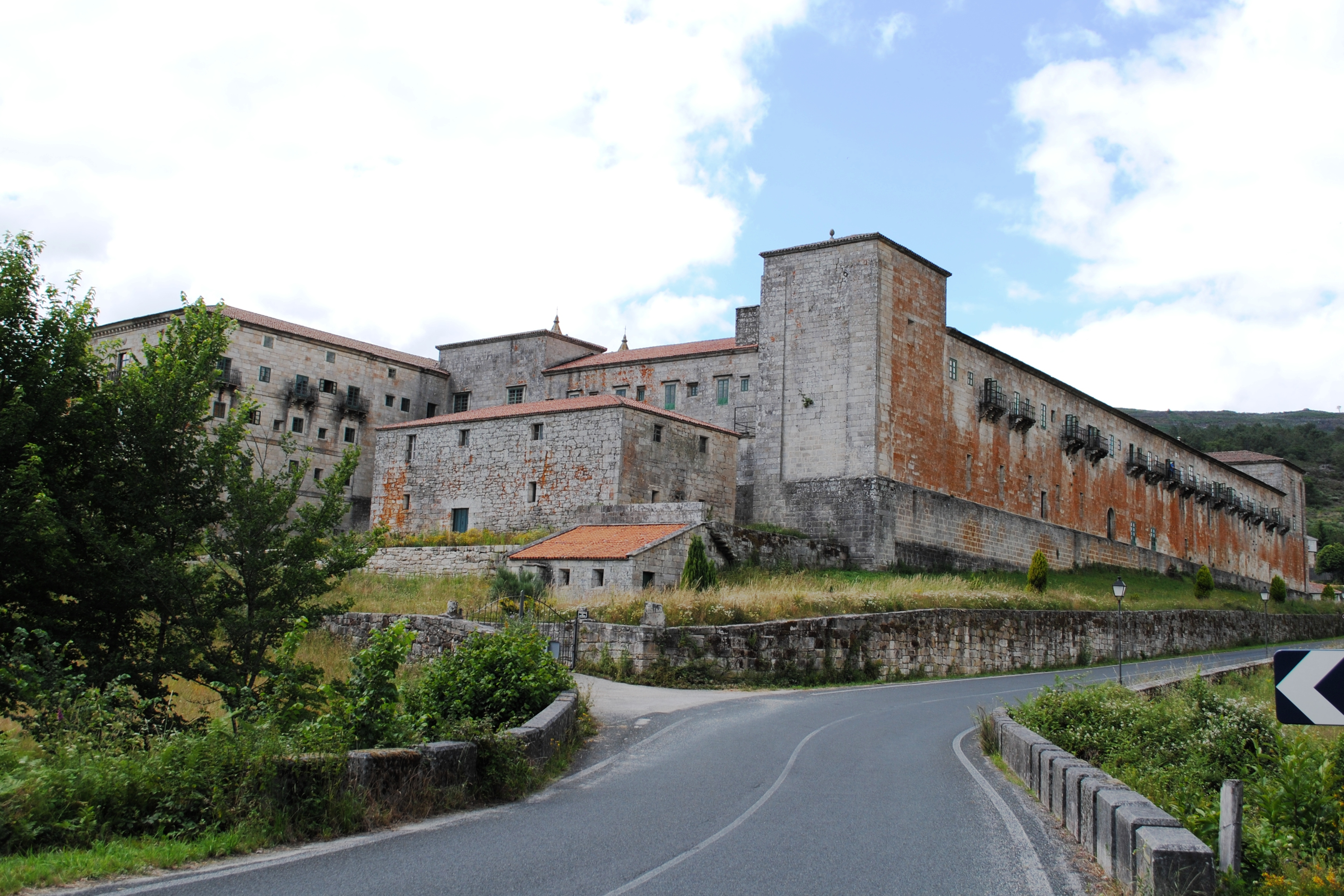 Mosteiro de Oseira, exterior.JPG